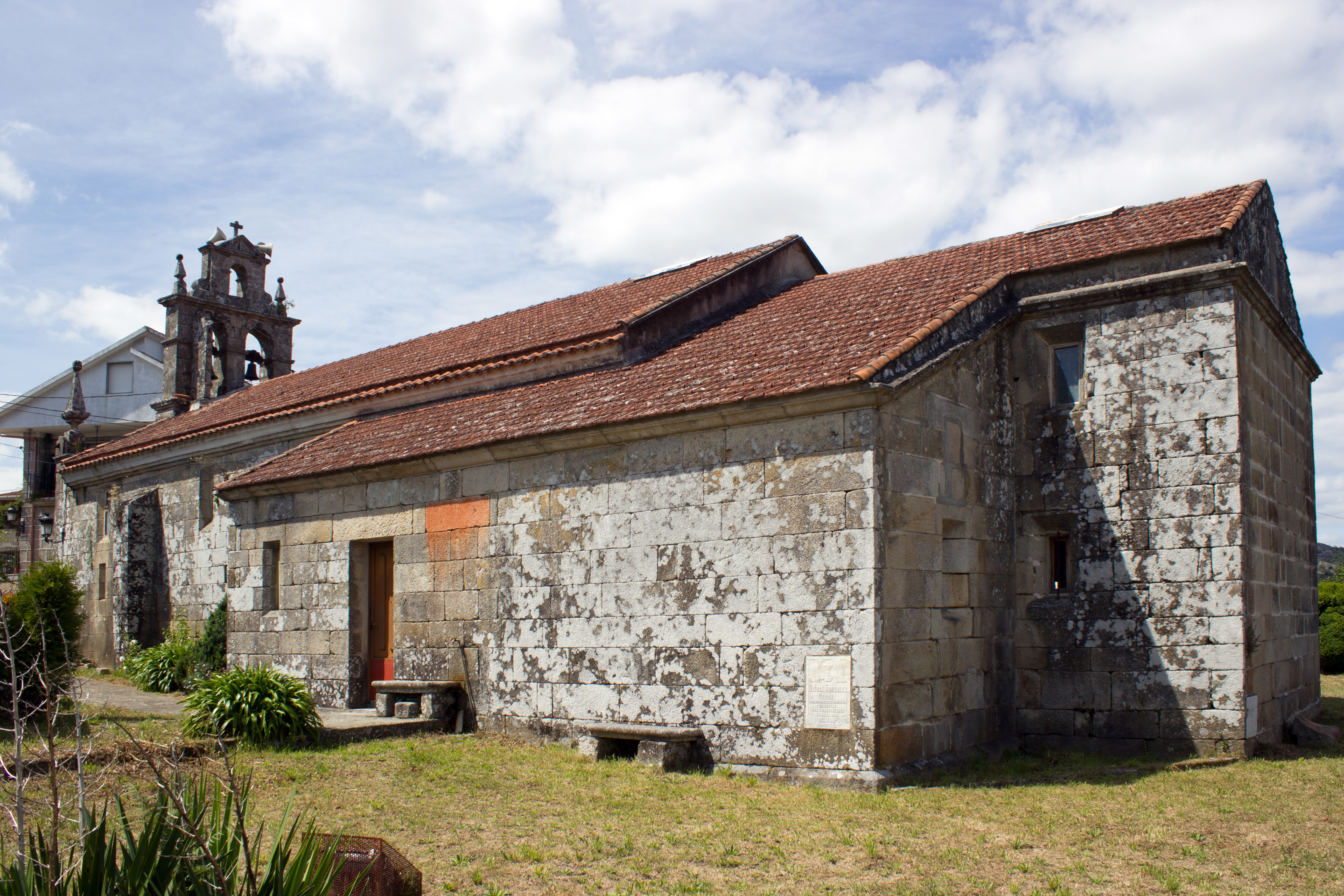 Igrexa de Santa María de Quins, no concello de Melón.